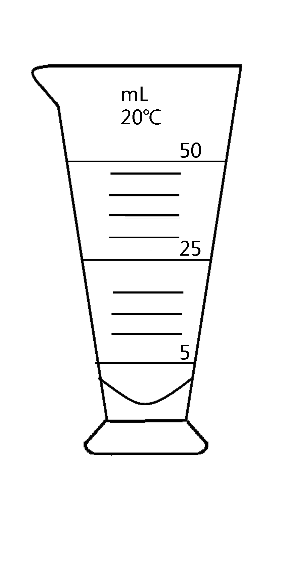 量杯素描图片